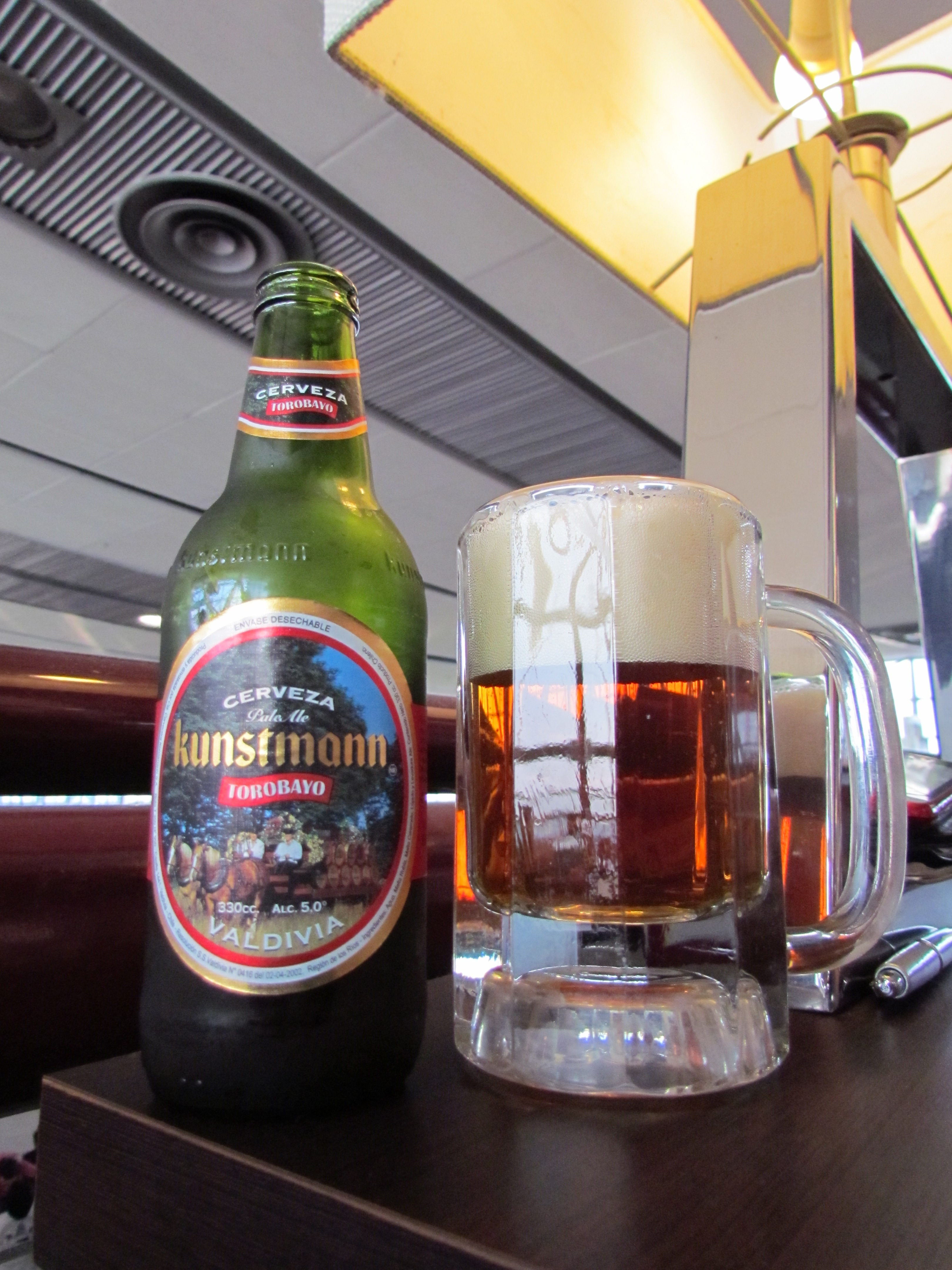 Kunstmann @ Chile